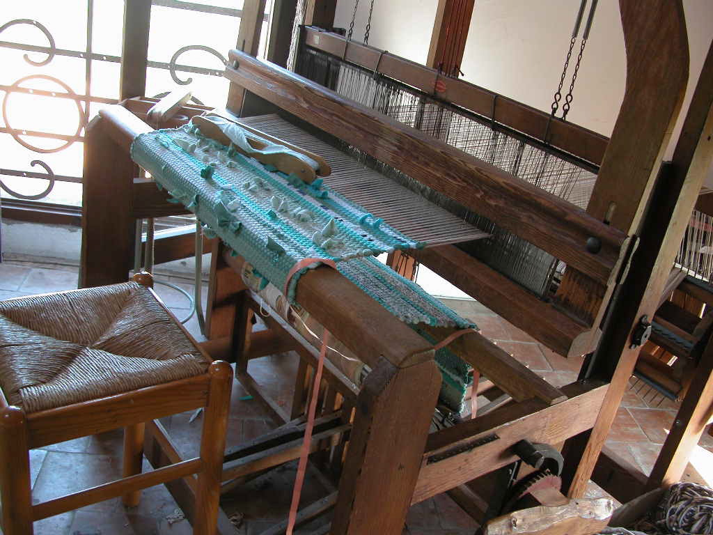 Foto mia personale, 2007, pezzotto in lavorazione sul telaio Licensing Categoria:Immagini sulla tessitura